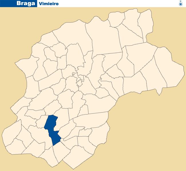 Localização de Vimieiro no concelho de Braga.